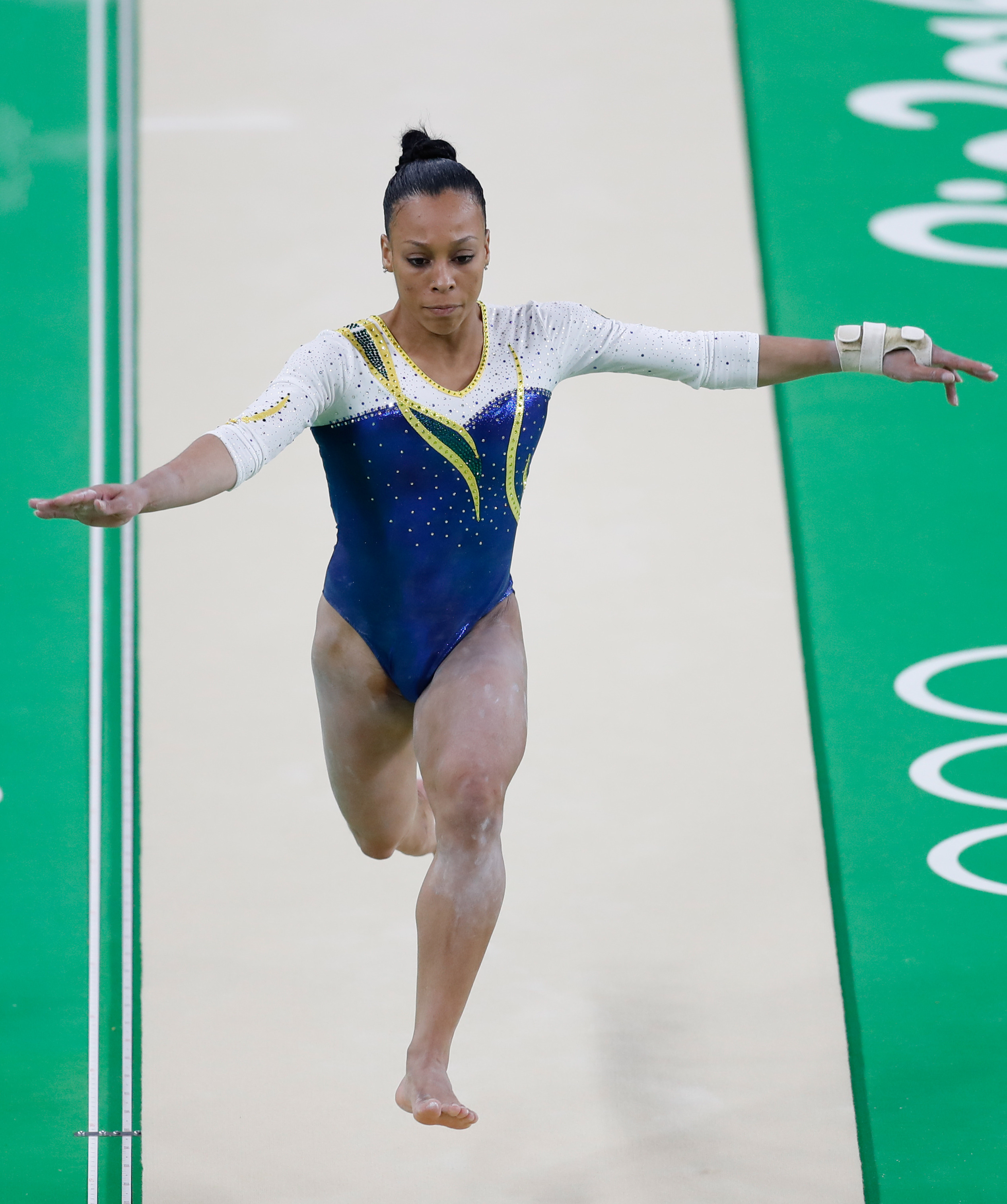 Rio de Janeiro - Lorrane dos Santos durante treino da seleção feminina de ginástica artística do Brasil na Arena Olímpica dos Jogos Rio 2016 (Fernando Frazão/Agência Brasil)